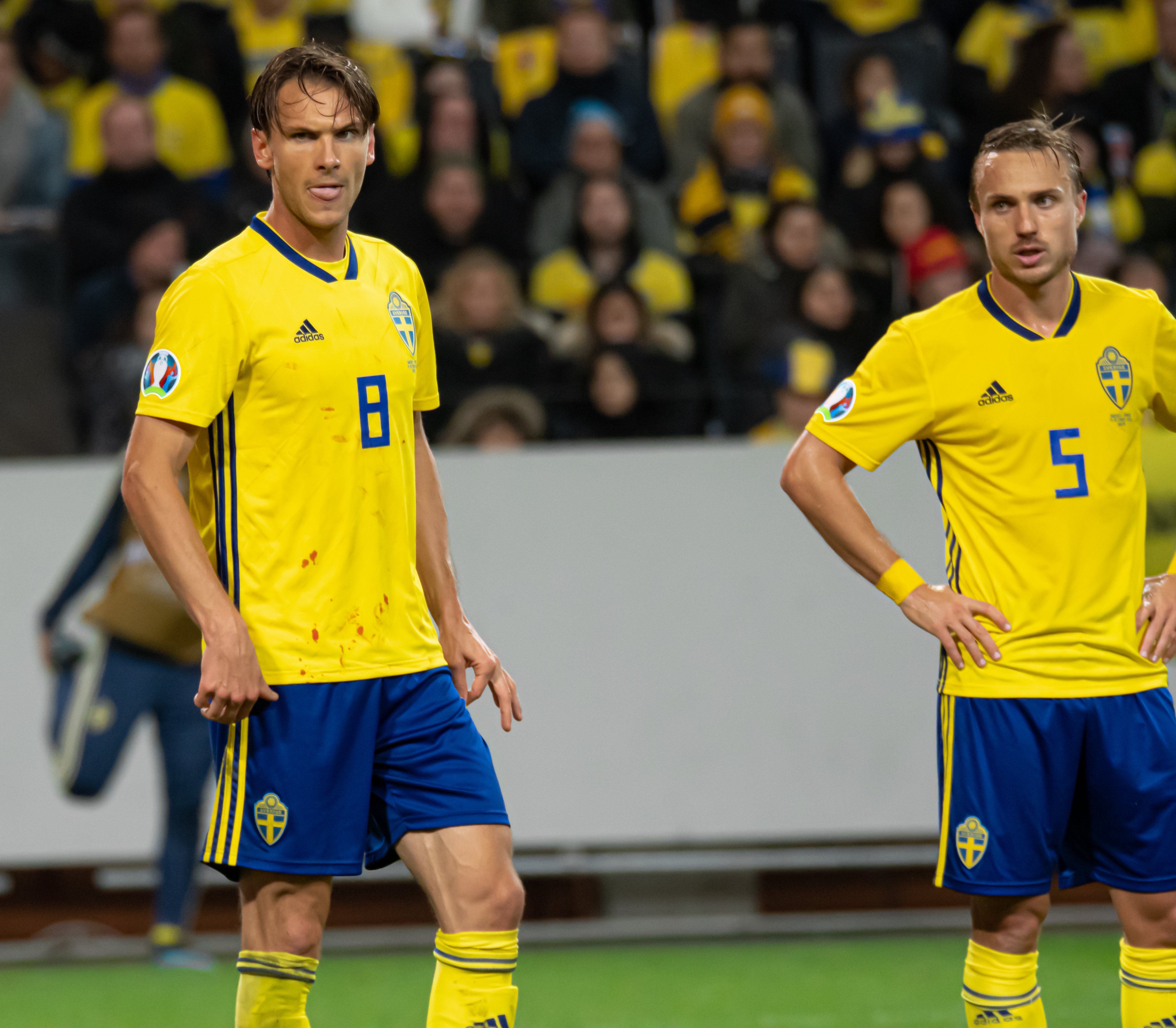 UEFA EURO qualifiers Sweden vs Spain 20191015